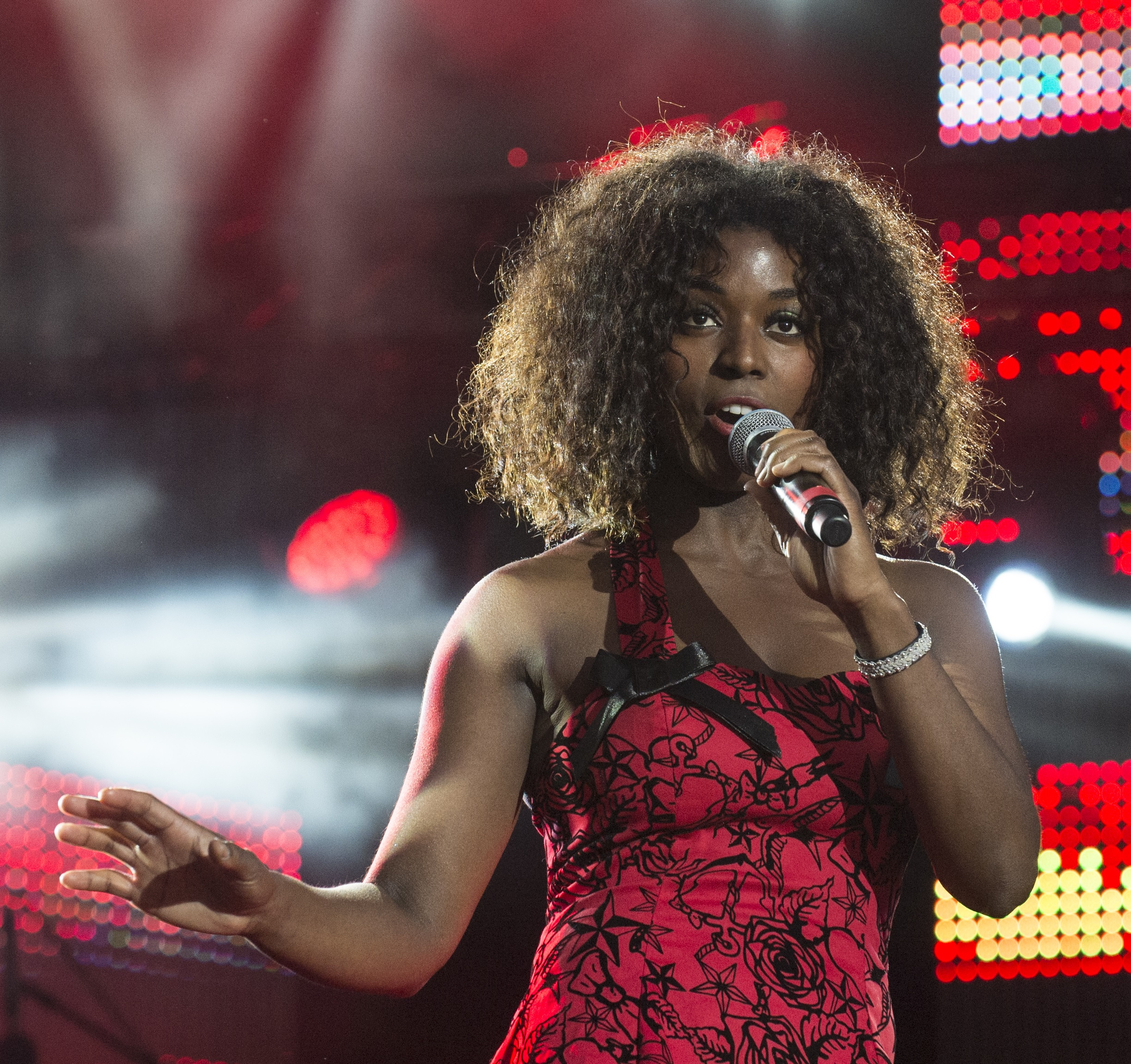 Artisten Caroline Wennergren.